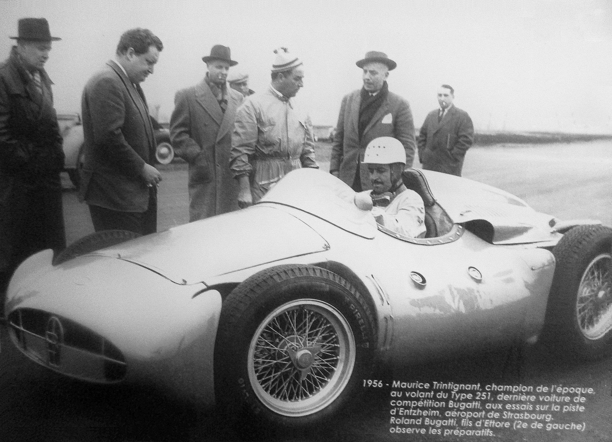 Bugatti Type 251 piloté par Maurice Trintignant sur la piste d'essai de l’aéroport de Strasbourg-Entzheim, avec Roland Bugatti (2eme à gauche)